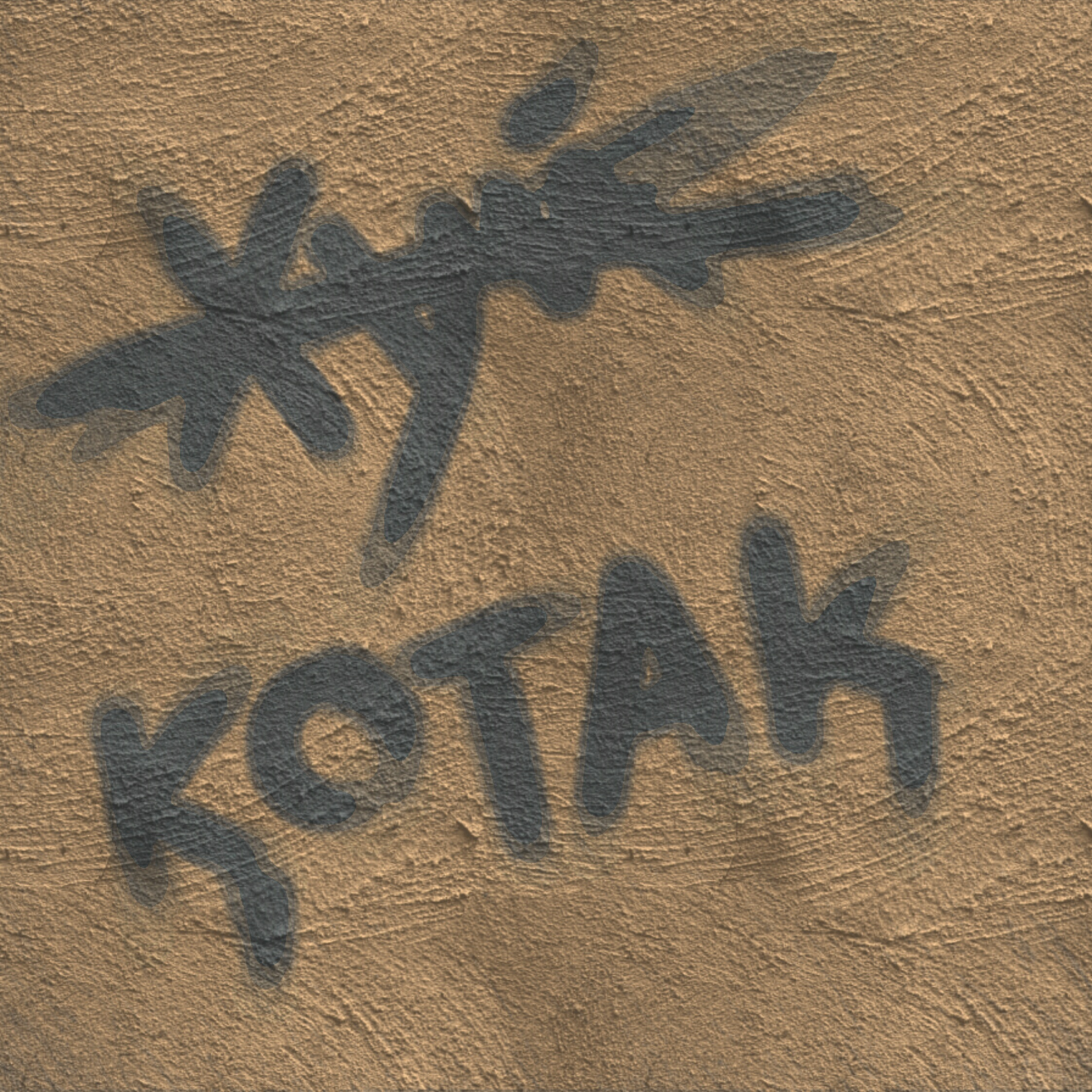 Изображение сделано с помощью приложений Autodesk Sketchbook Pro и Paper Artist для ОС Android.